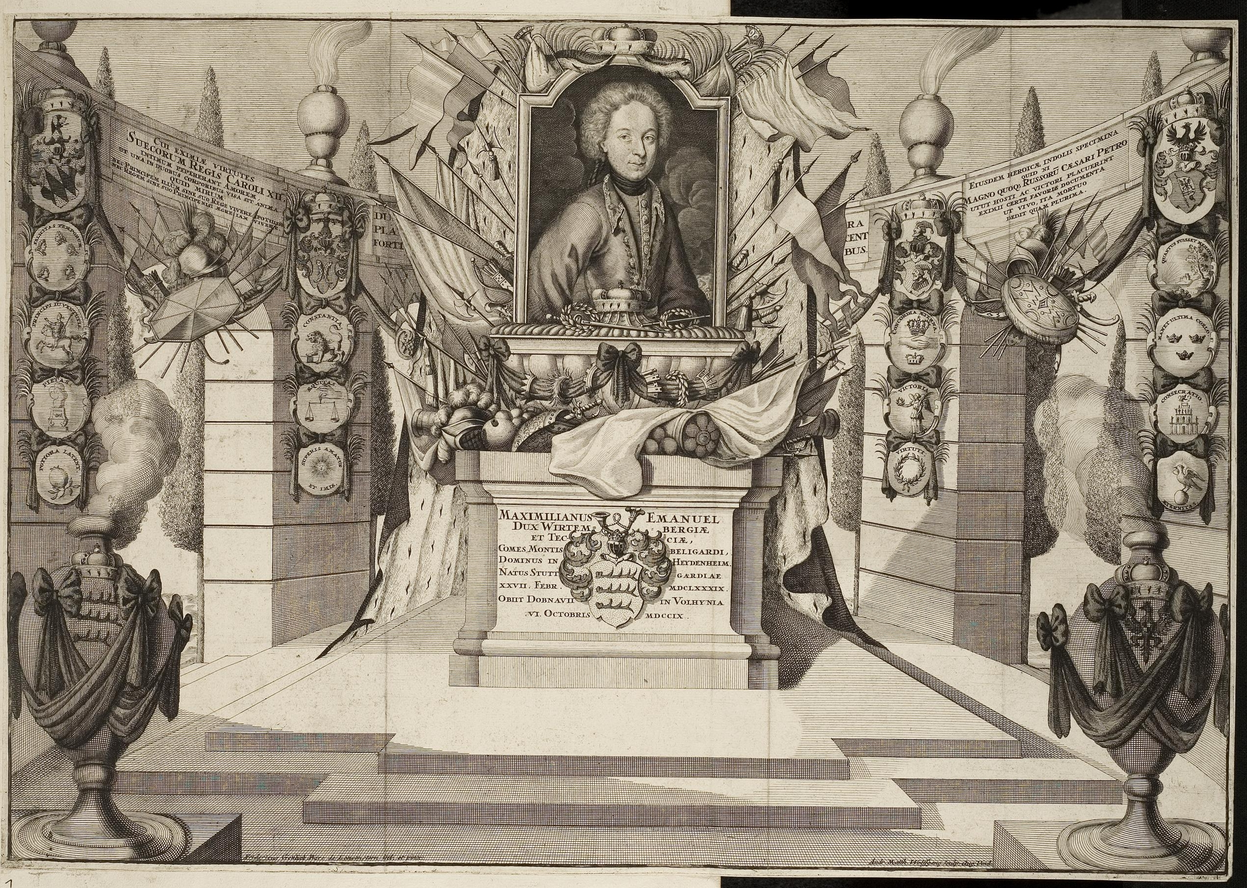 Grafik aus dem Klebeband Nr. 1 der Fürstlich Waldeckschen Hofbibliothek Arolsen Motiv: Maximilian Emanuel von Württemberg-Winnental